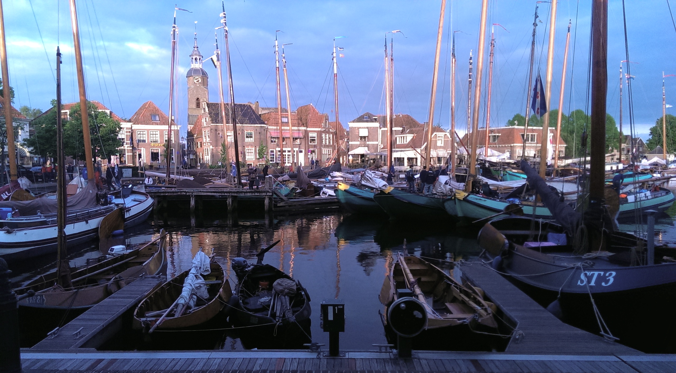 Volle havenkom van Blokzijl voorafgaand aan de Mattenschippersrace 2014